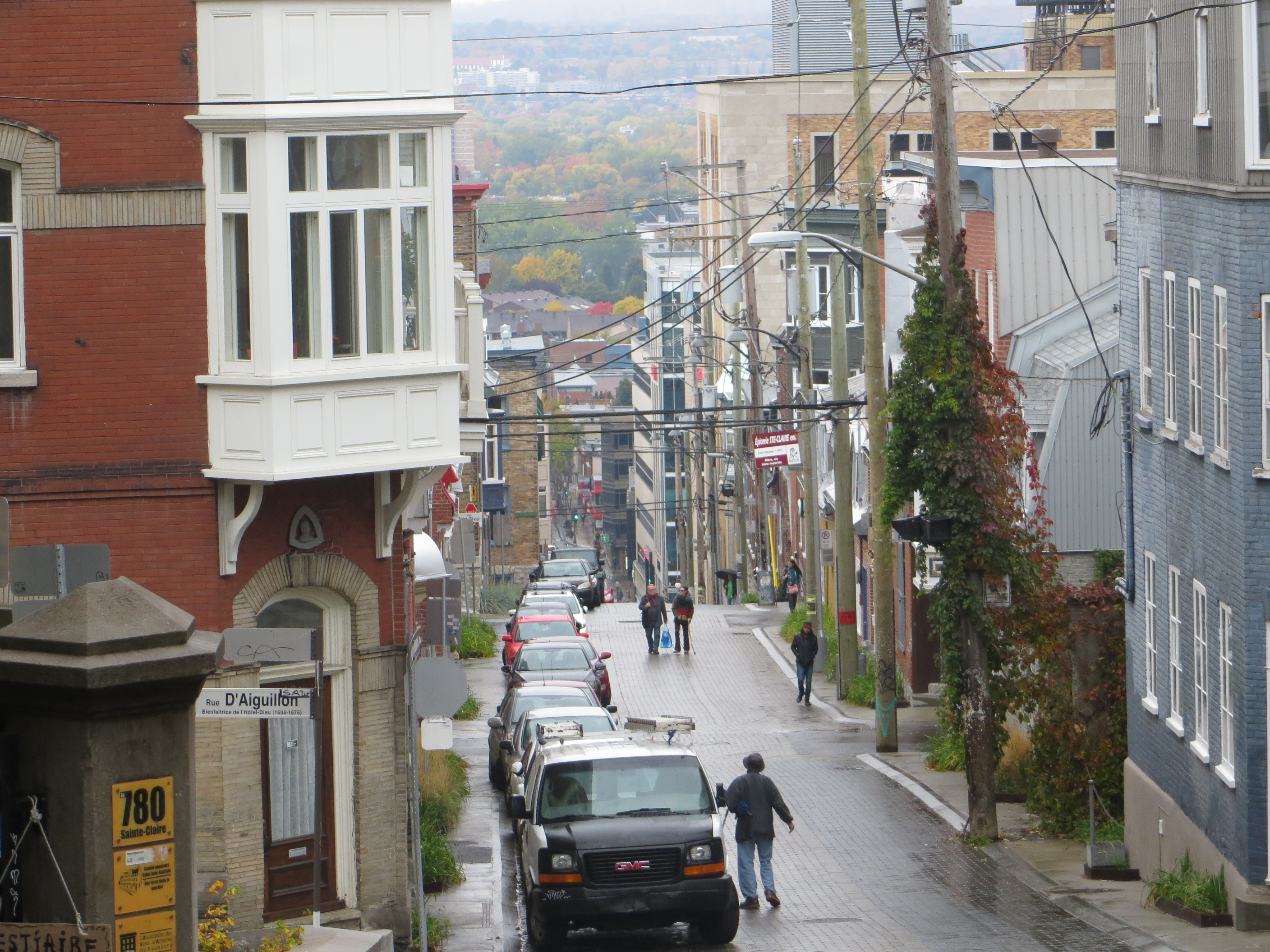 20161008 16 Rue Sainte-Claire @ Rue D'Aigullon